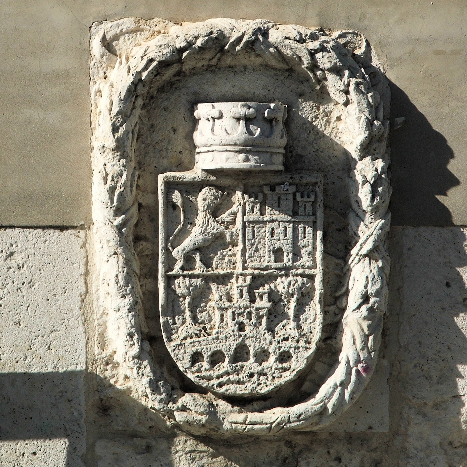 Escudo tudelano bajo la Virgen de la Guía en Tudela de Duero (España)